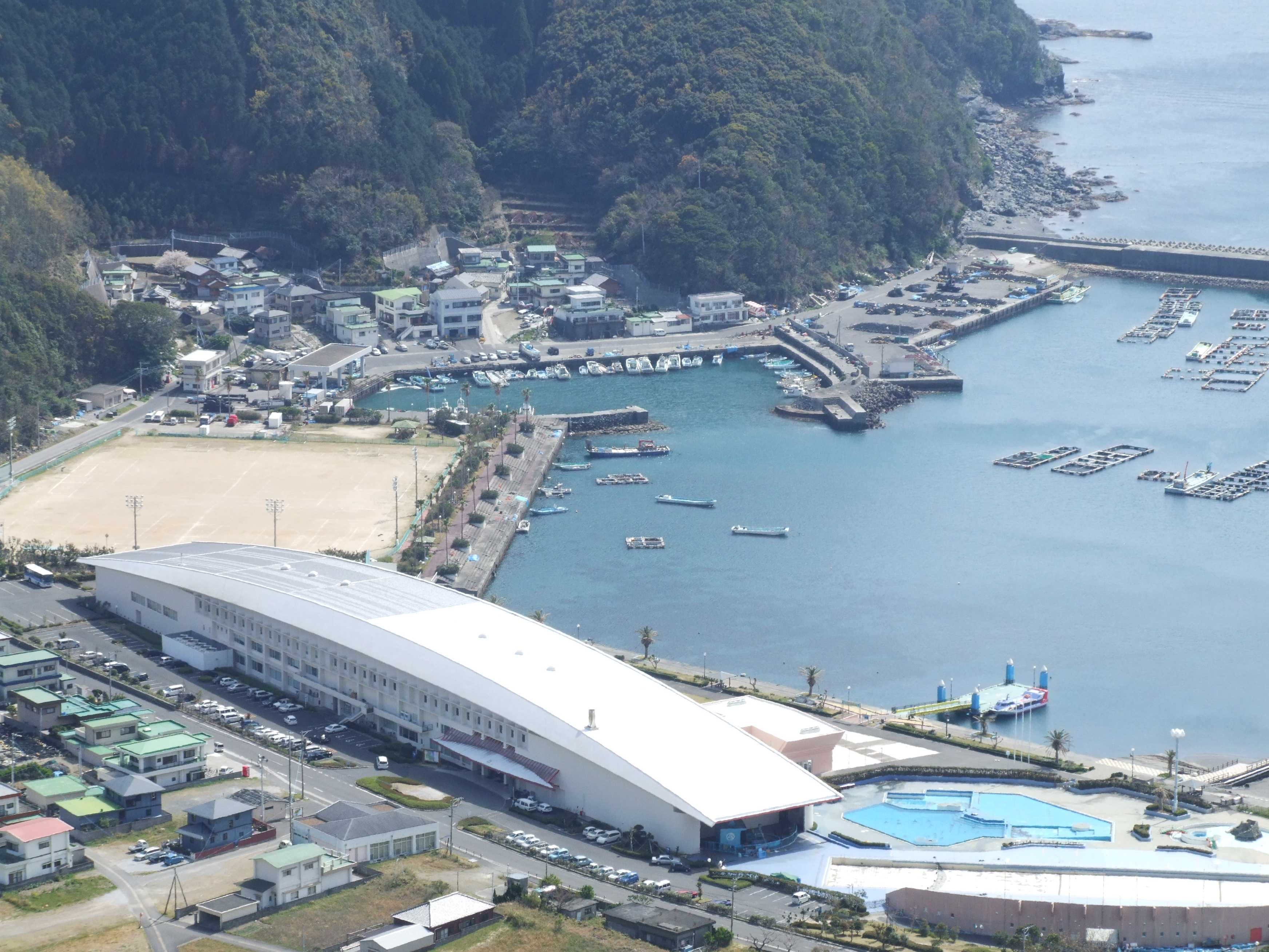 Oita-ken Marine Culture Center 大分県マリンカルチャーセンター